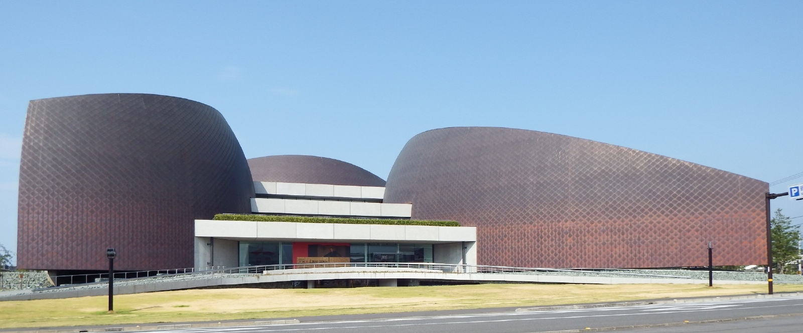 あかがねミュージアムを正面より